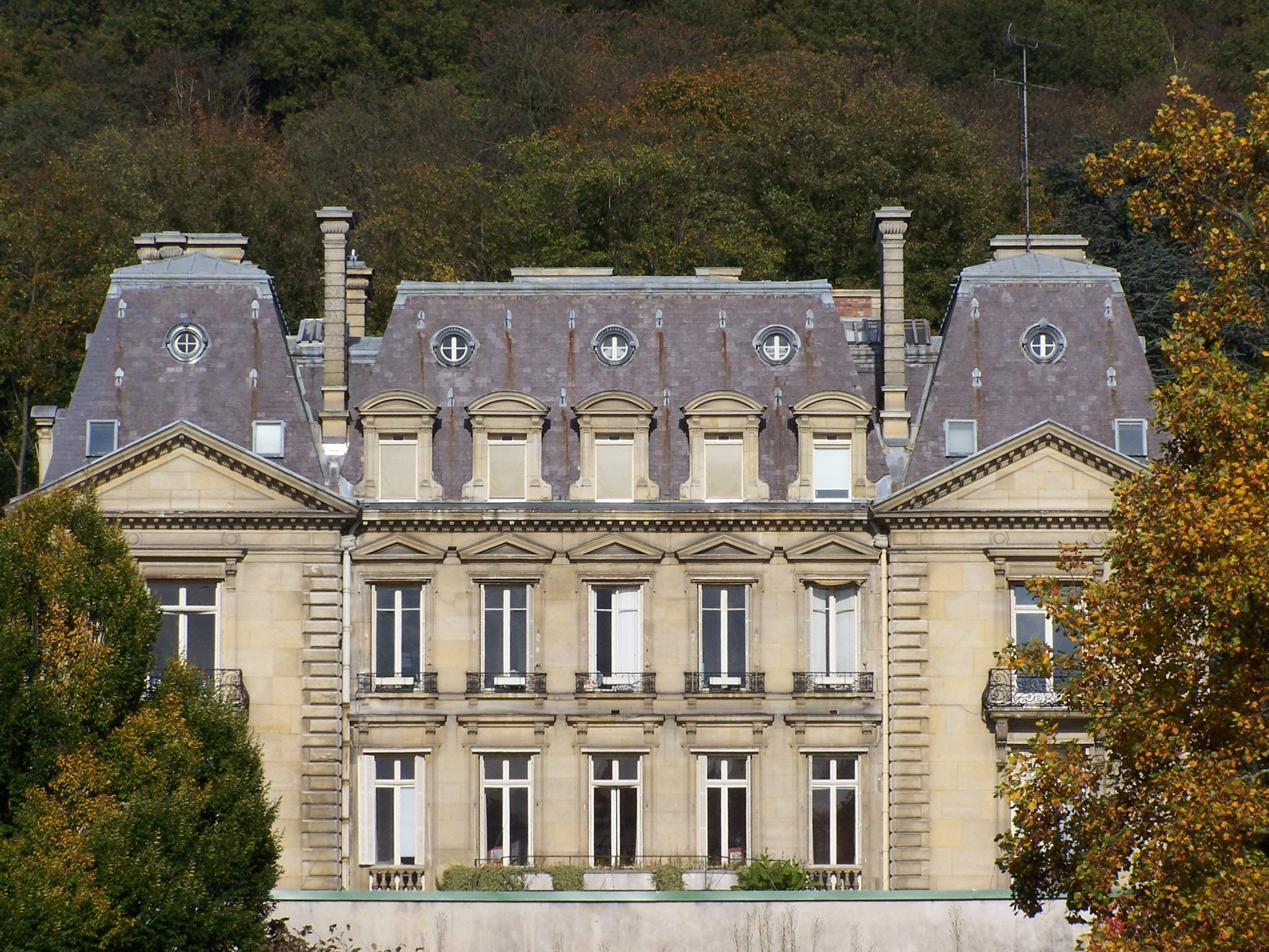 Château de Vilvert à Jouy-en-Josas (Yvelines, France)